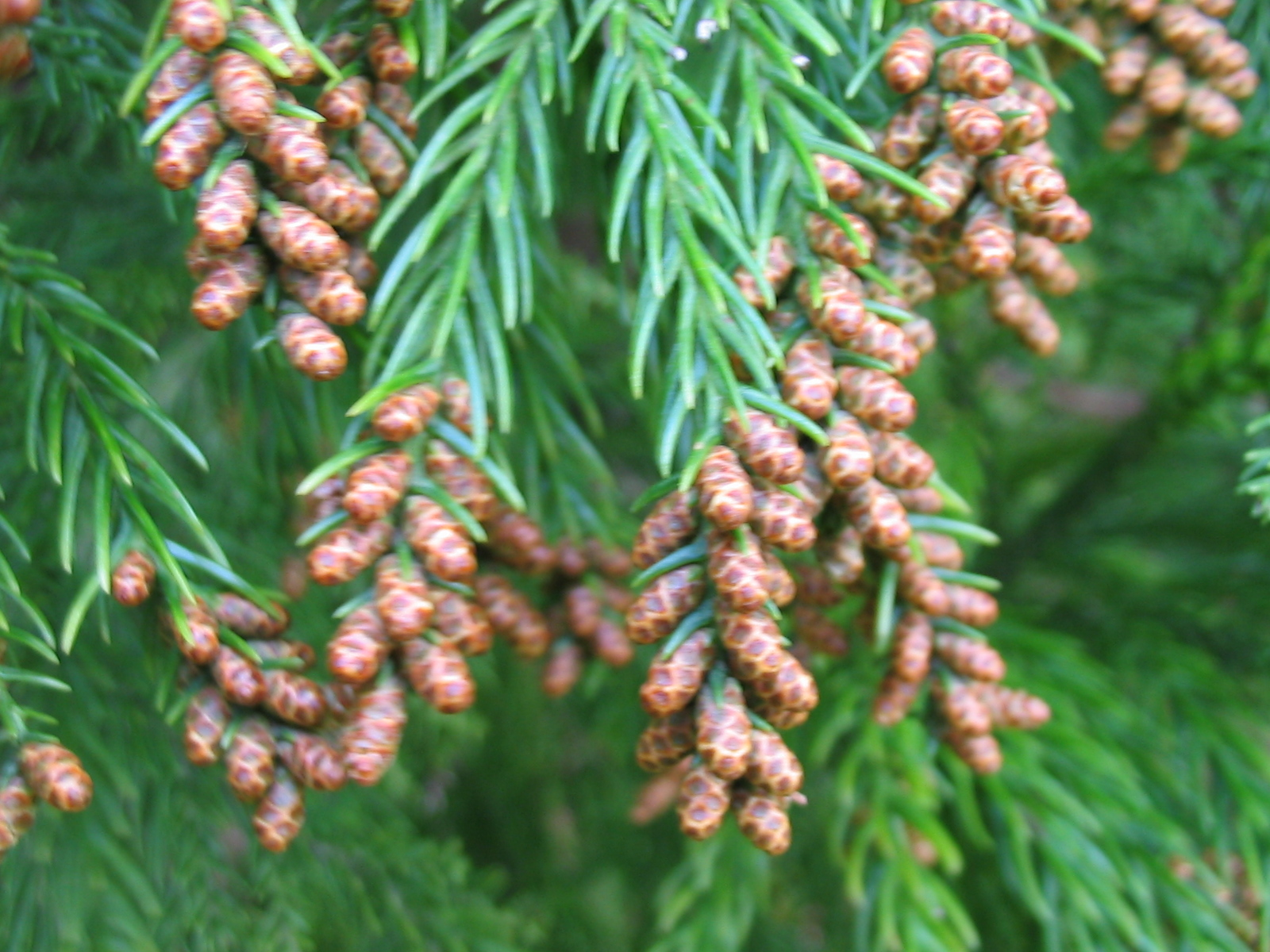 Sicheltanne (Cryptomeria japonica) - male Cones